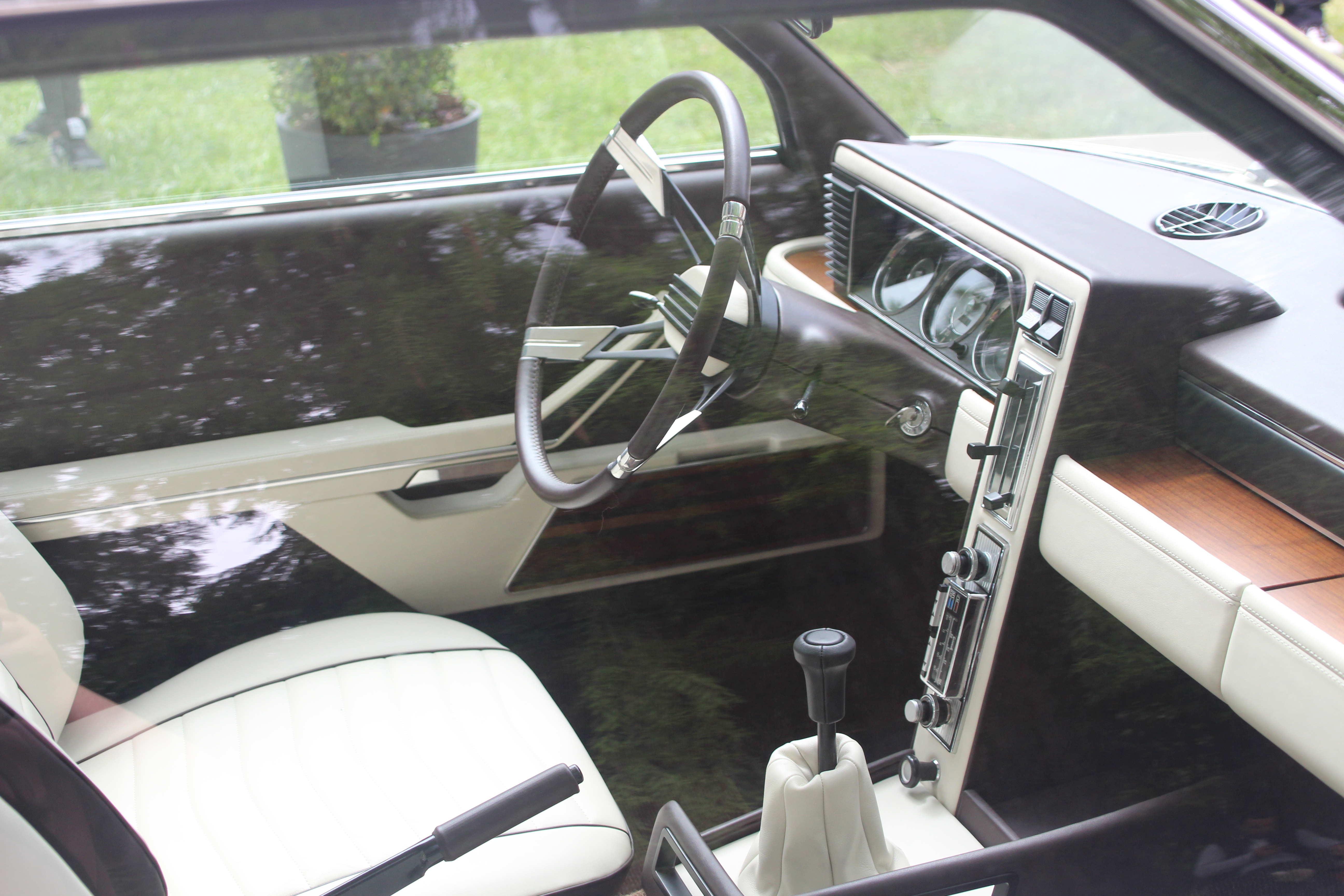 2002ti-Garmisch Nachbau, Blick in den Innenraum